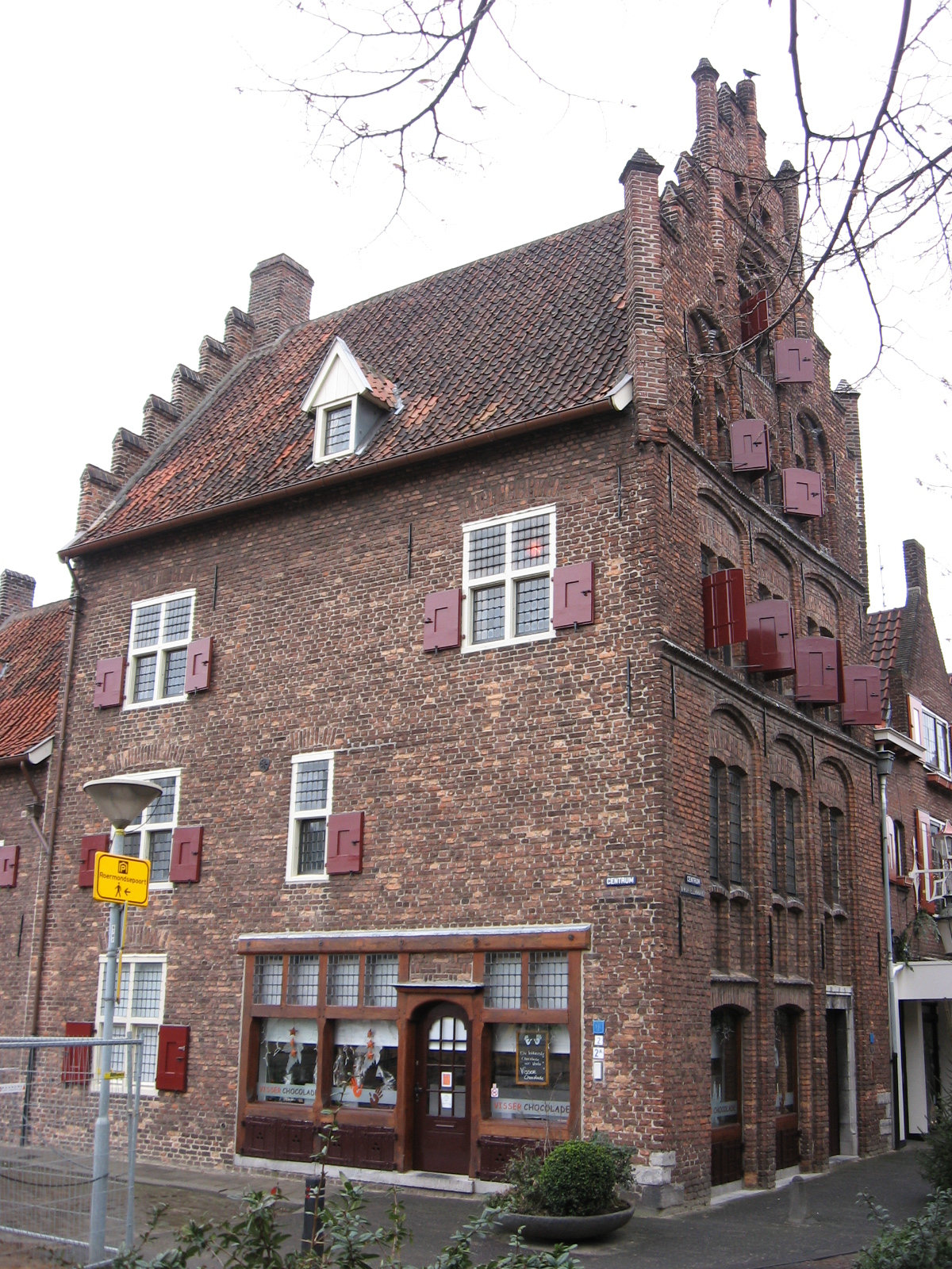 Venlo, Römerhuis